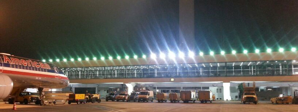 El remodelado Aeropuerto Internacional